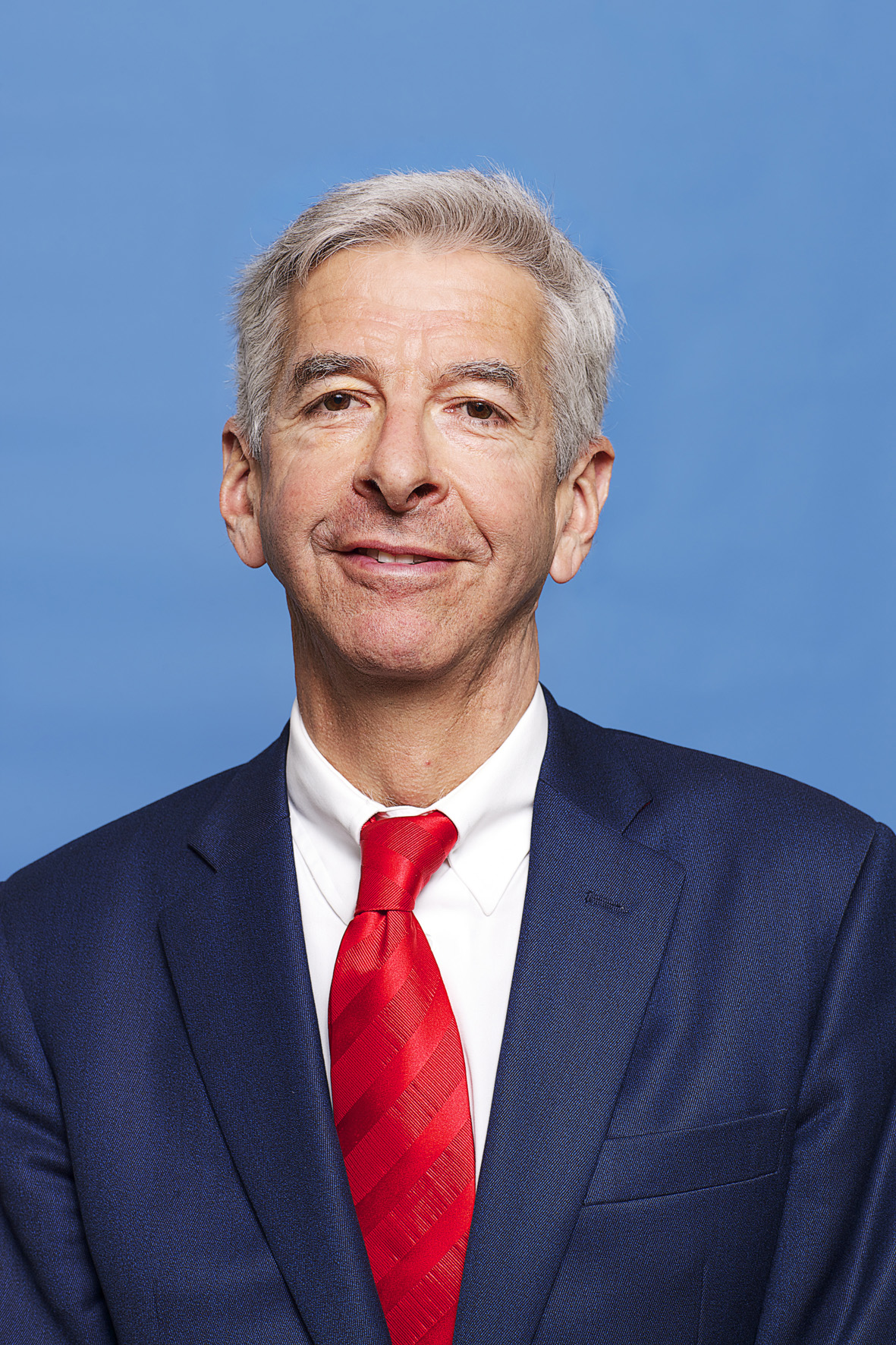 Ronald Plasterk, Tweede Kamerlid. Foto: Lex Draijer.